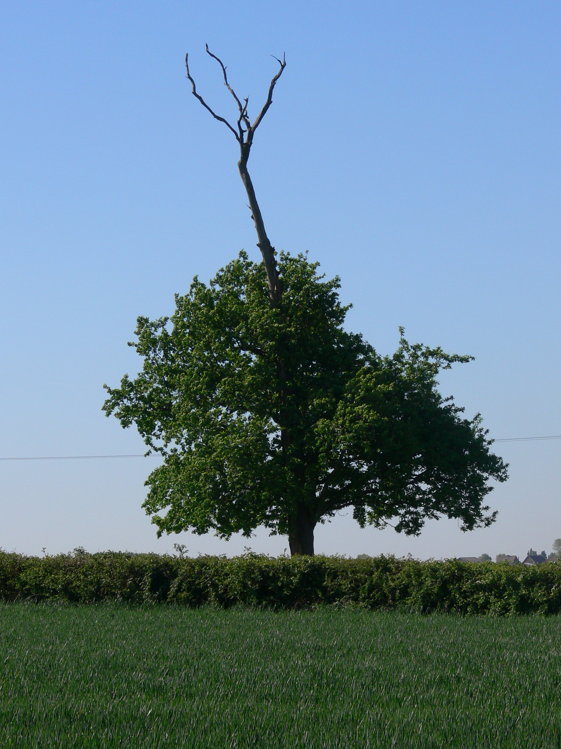 Descente de cîme, mais aussi exemple de résilience écologique.